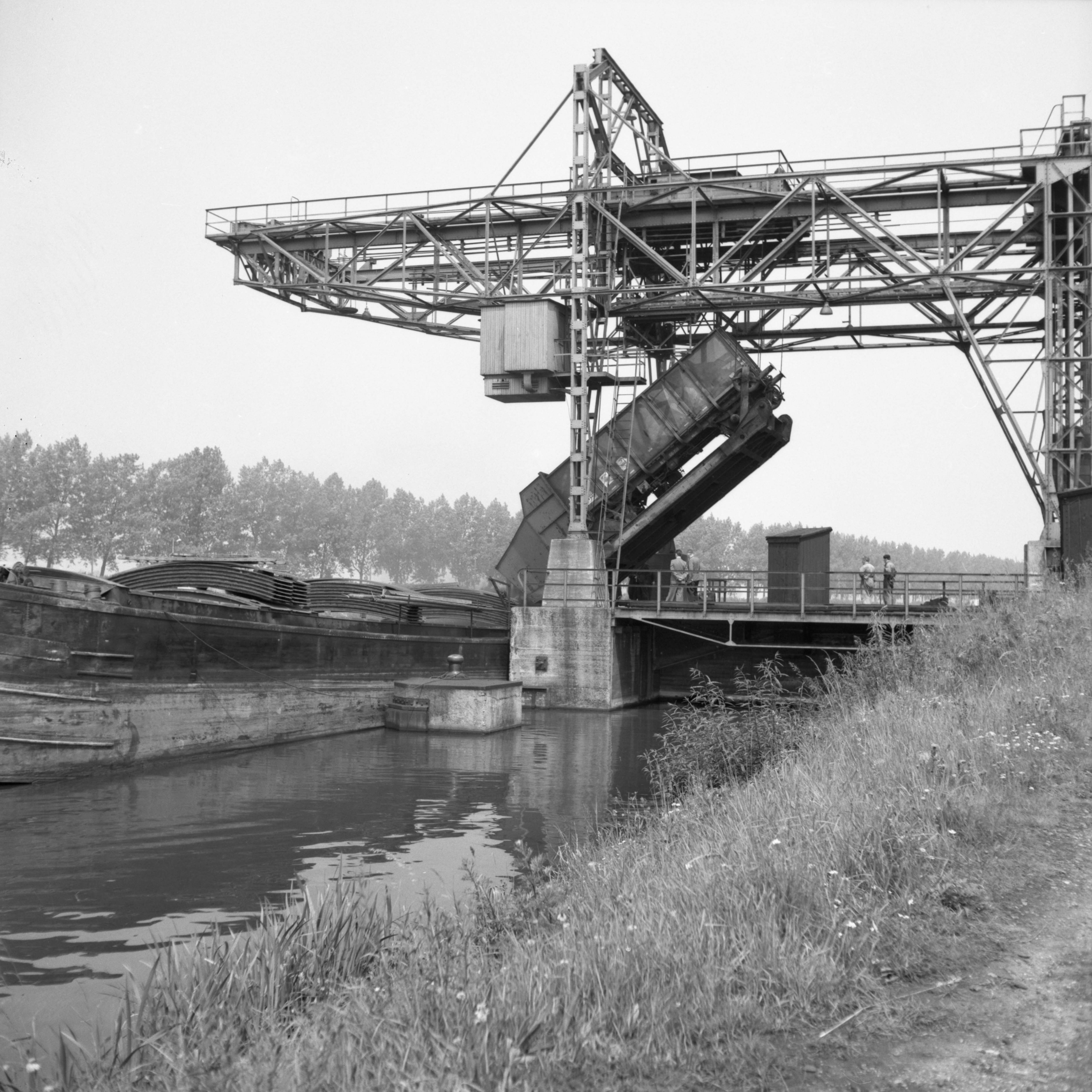 Gezicht op de kolentip (overslag van steenkolen van trein op schip) aan het Julianakanaal te Born.